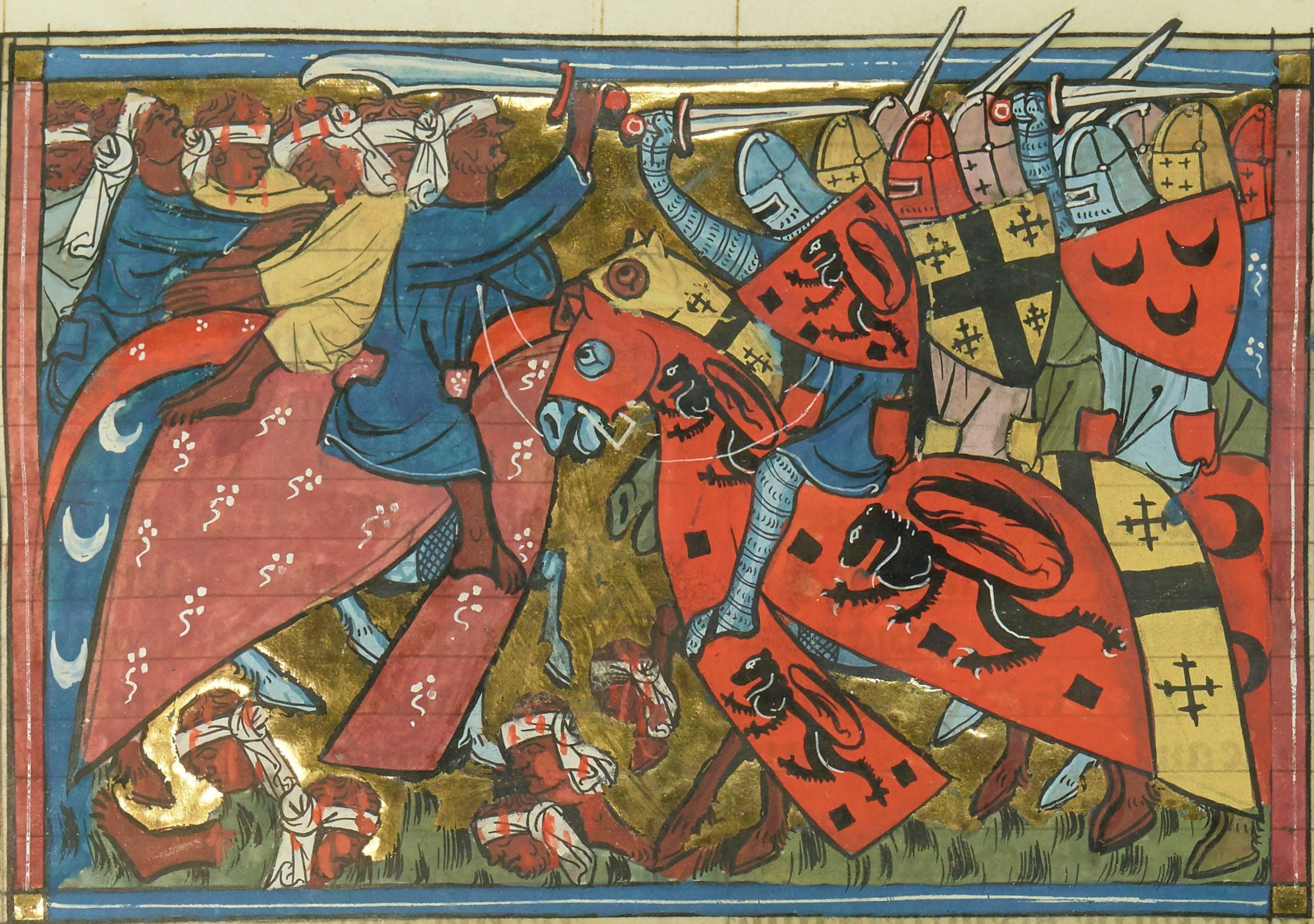 Bataille de Antiochie (1098)